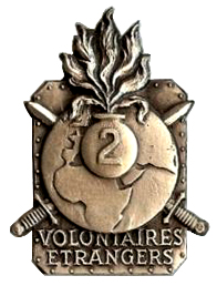 Insigne régimentaire du 22e régiment de marche de volontaires étrangers